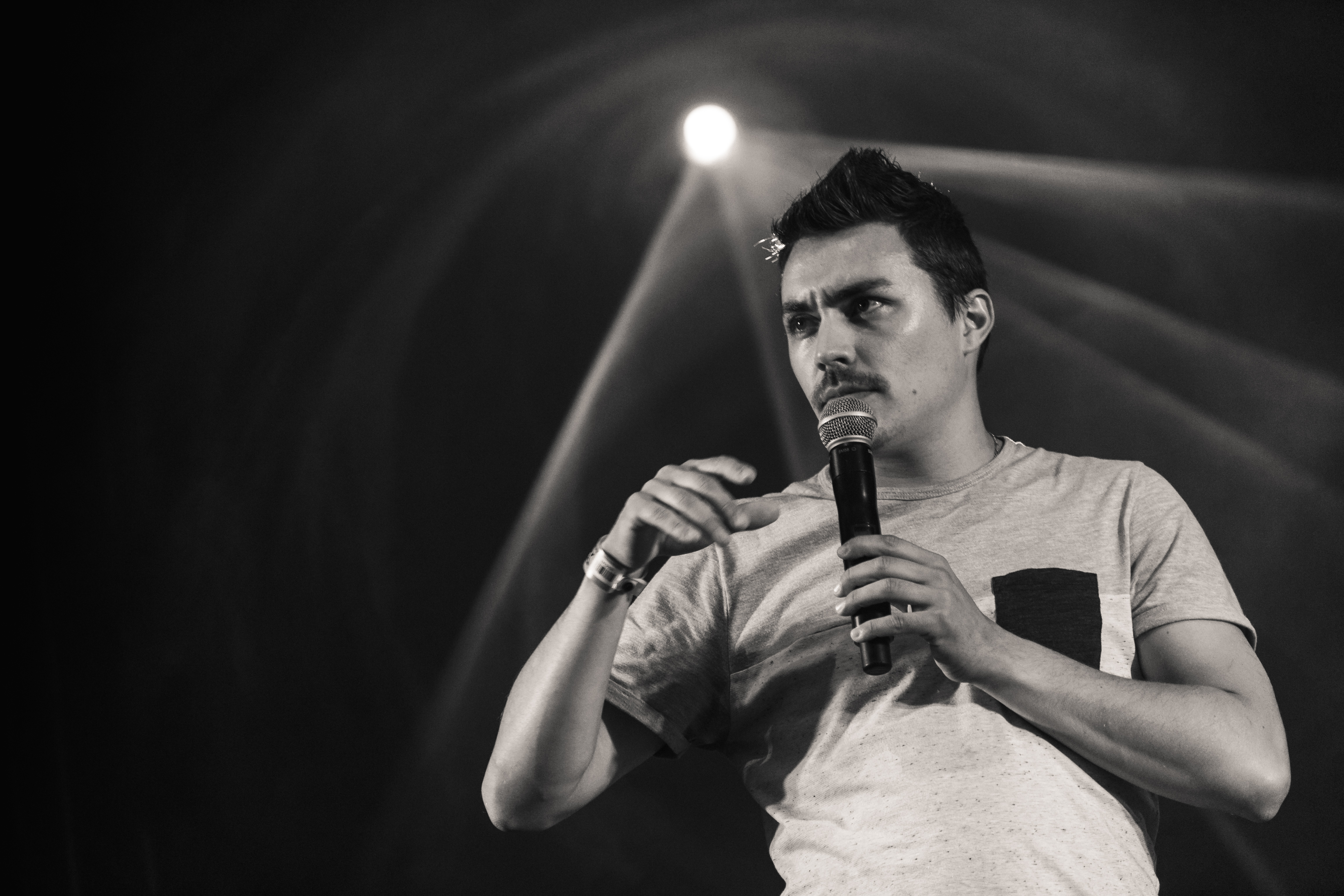 Krismenn & Alem en concert sur la grande scène des fêtes maritimes de Brest 2016.